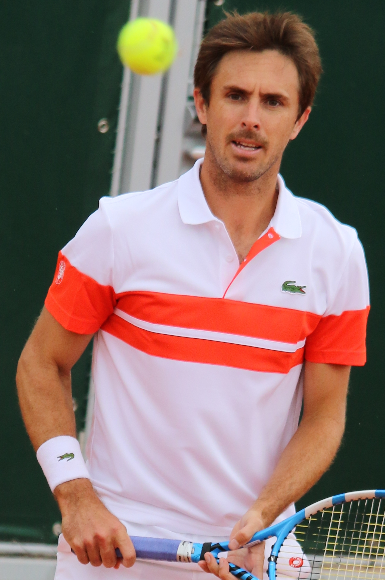 Roger Vasselin RG19 (3)